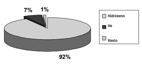 Gráfico de queixos sobre a habundancia dos elementos no universo